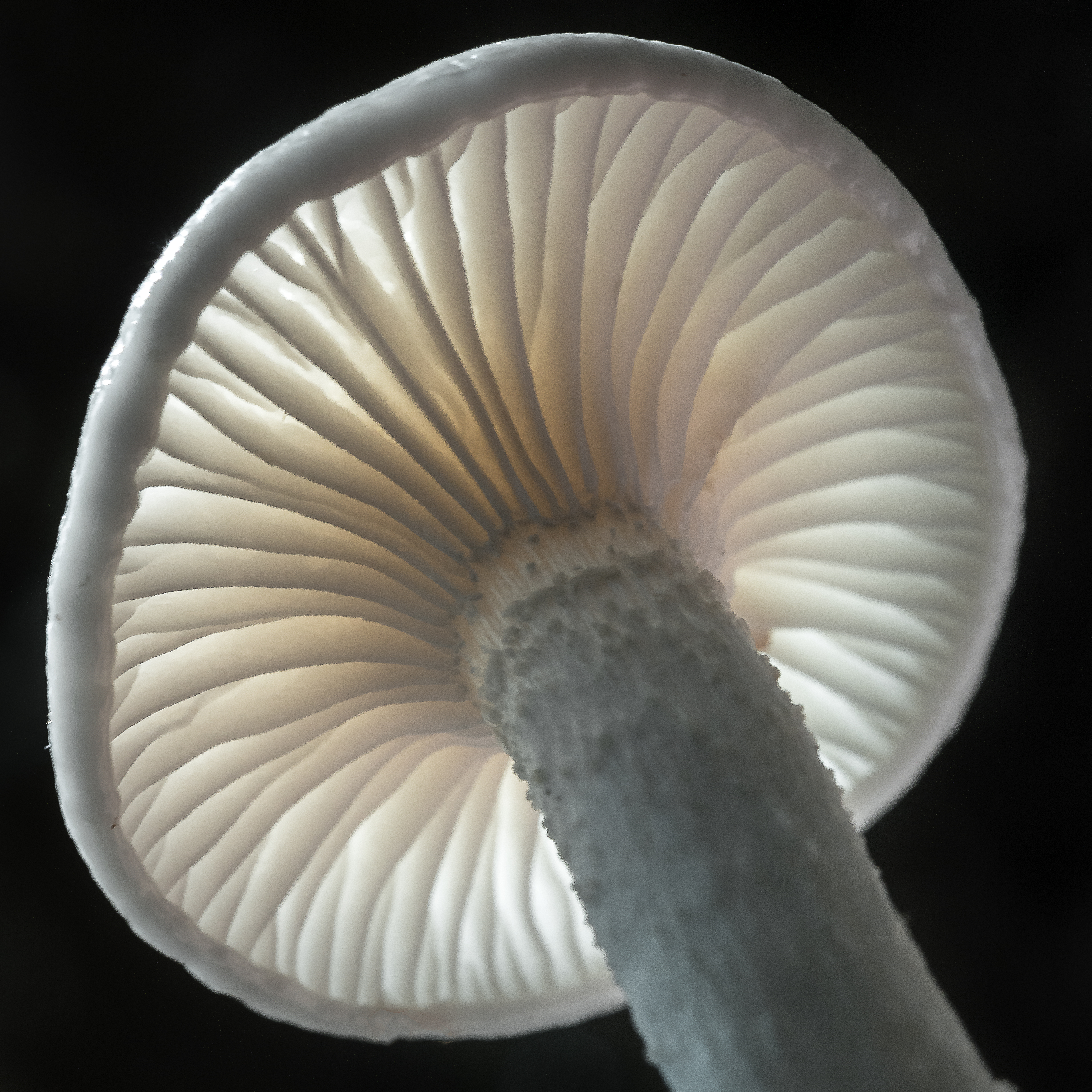 Vue macro de la base du pied et des lames de l'Hygrophorus cossus. Lumière en contre-jour. Forêt de Pouillé (Vienne - France)